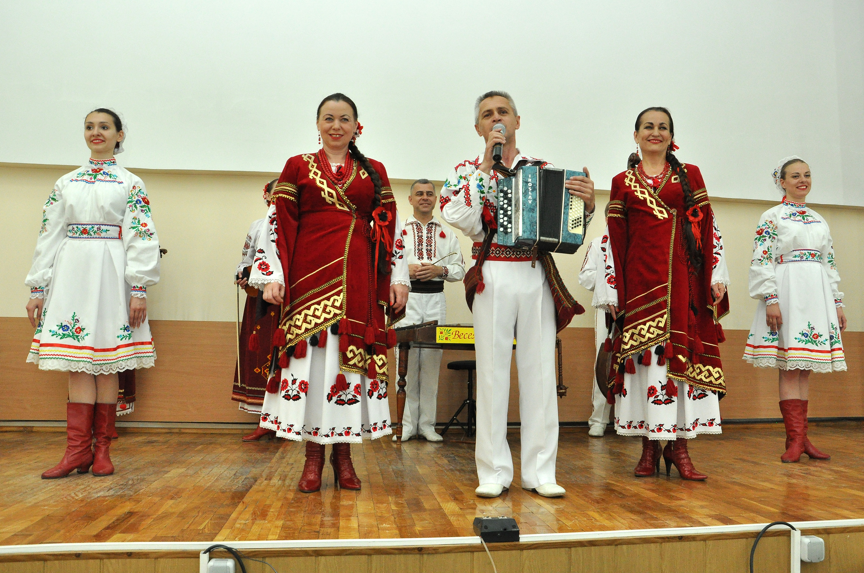 Ансамбль народної музики Тернопільської обласної філармонії «Веселі галичани» під час виступу в «Тернопільській університетській лікарні» у День медичного працівника.